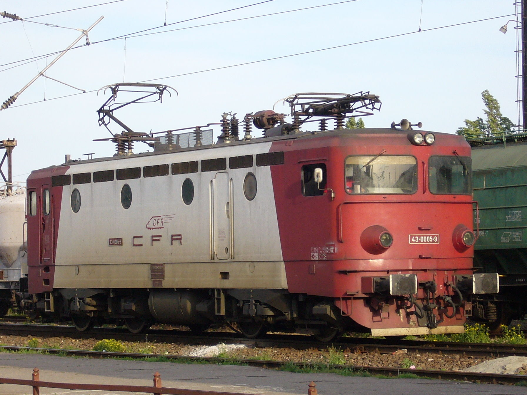 Locomotiva CFR clasa 42